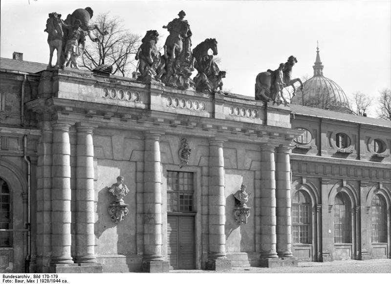 Potsdam.- Lustgarten